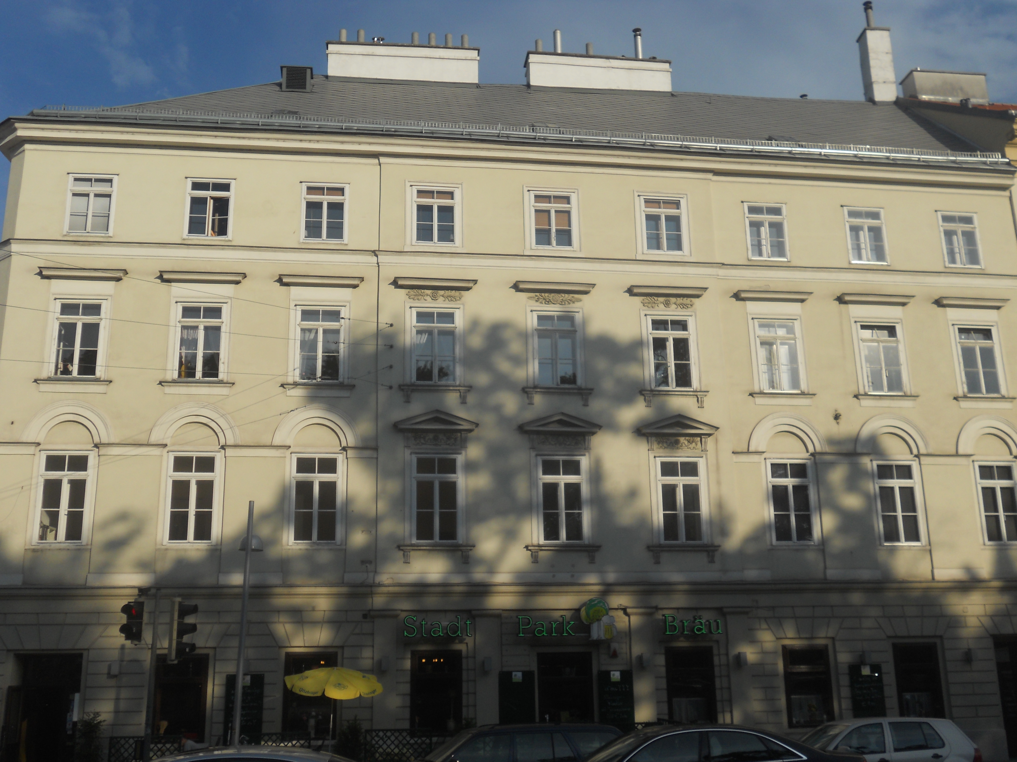 Haus Am Heumarkt 5 in Wien